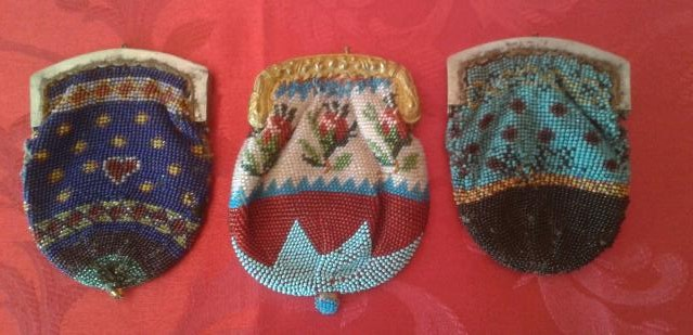 Monederos españoles bordados con abalorios. S XIX. Servían como complemento de moda y eran muy apreciados entre las clases altas. La boca está realizada en bronce labrado en el del centro y en hierro pulido en los de los laterales de la foto.